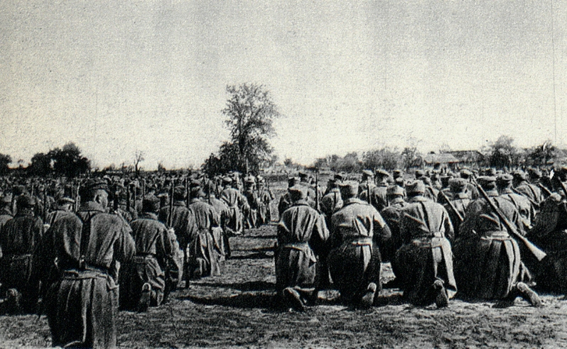 Legiony Polskie. Nabożeństwo w Karasinie.